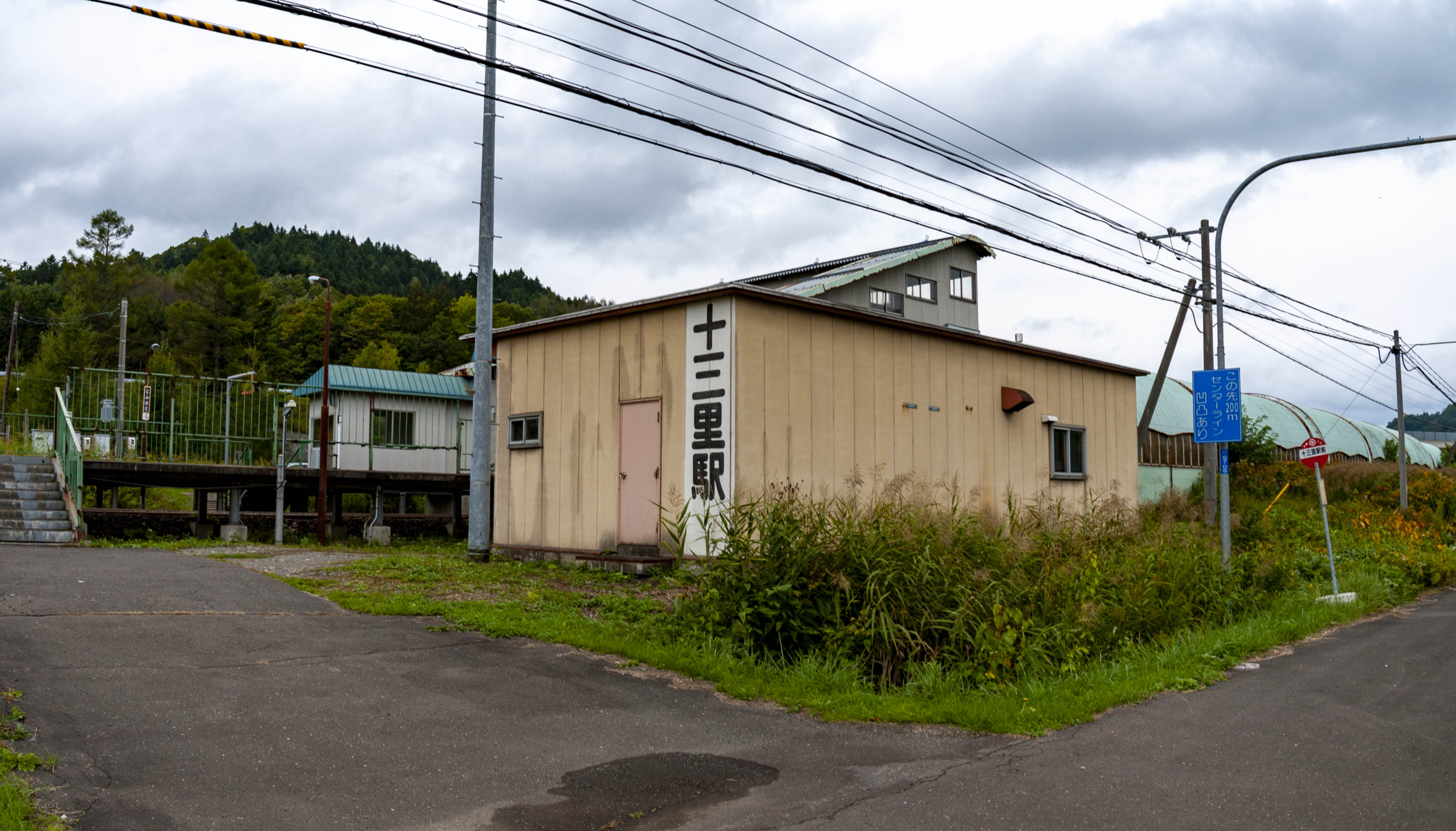 北海道旅客鉄道石勝線十三里駅（現十三里信号場）入口付近